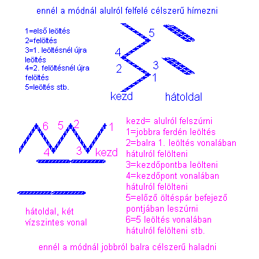 Fogasöltés módjának leírása